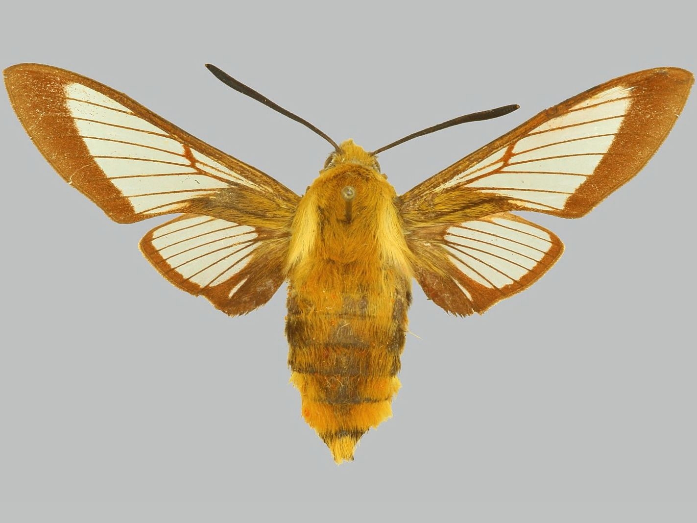 Hemaris affinis, самка из Китая